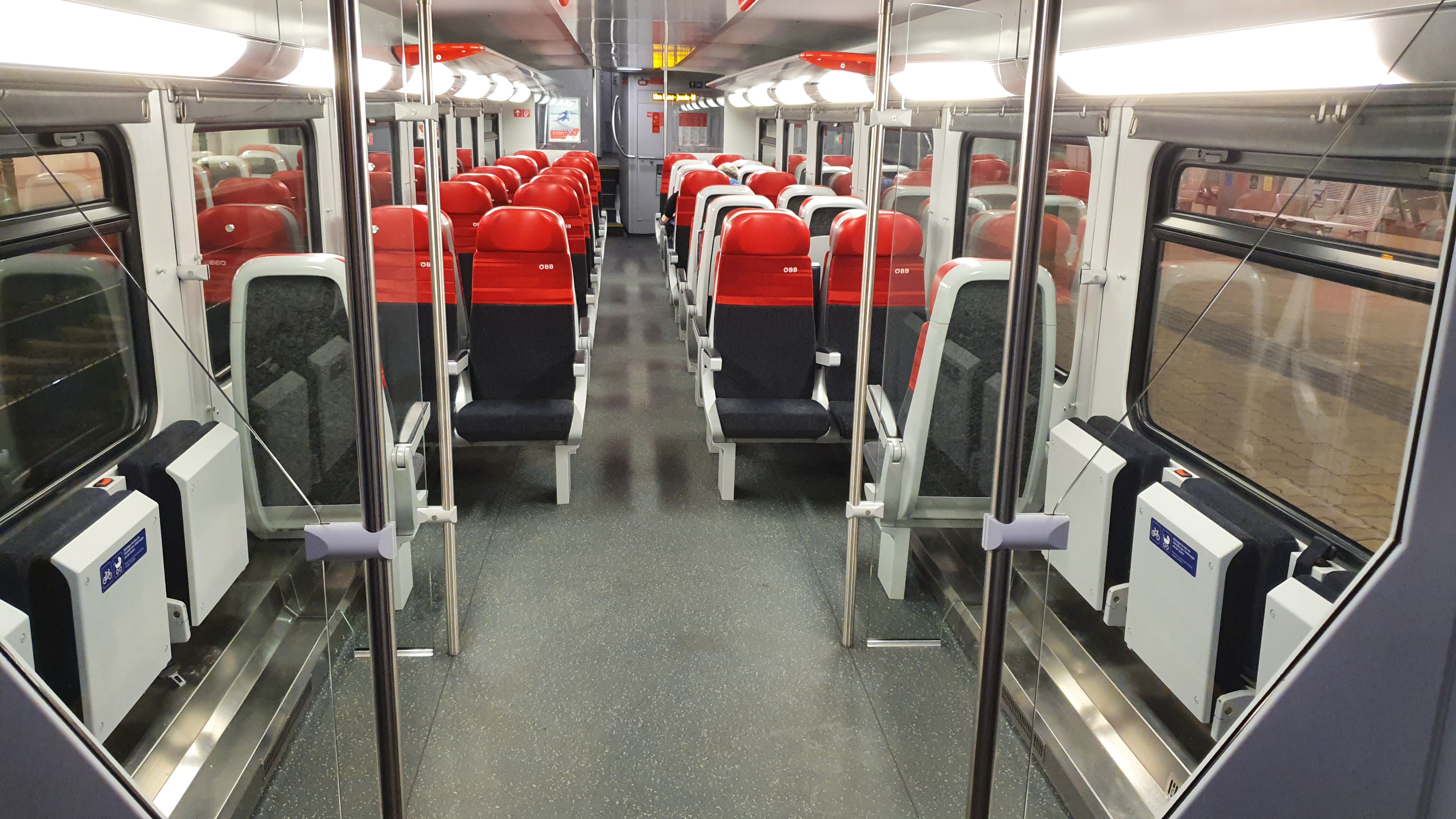 Die untere Etage eines Cityjet-Dosto-Zwischenwagens. Sie besteht aus einem Mehrzweckbereich mit 6 Klappsitzen sowie daran anschließend einem Sitzbereich.